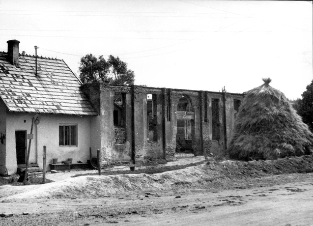 Беларуская (тарашкевіца): Германавічы (Hiermanavičy). Зруйнаваная сынагога